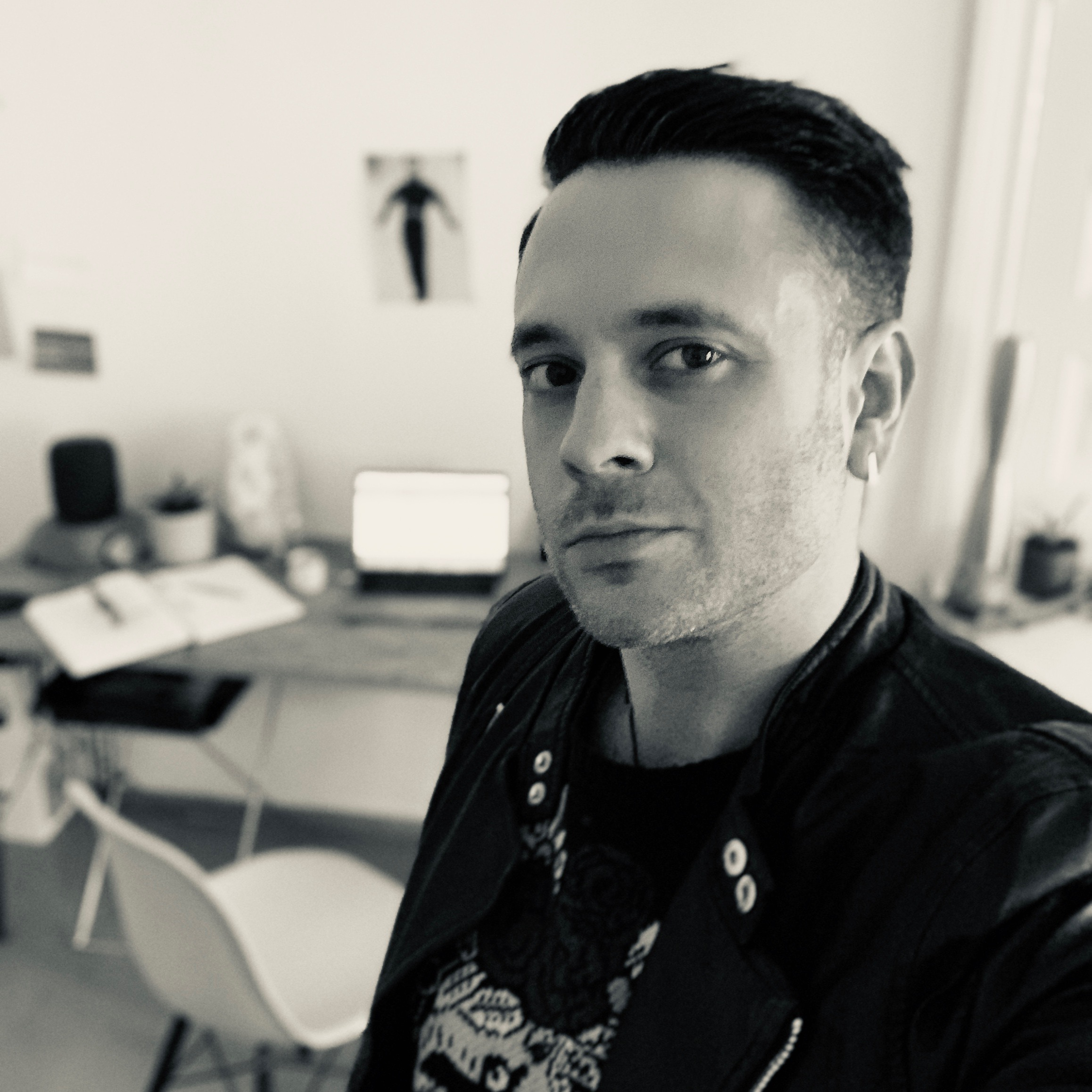 Can Fischer Portrait 2019